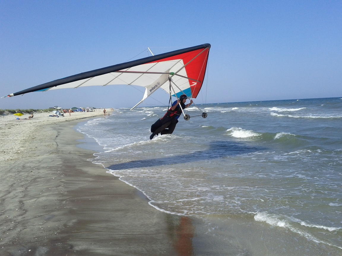 Testarea dunelor de nisip de la plaja Vadu in zbor cu deltaplanul